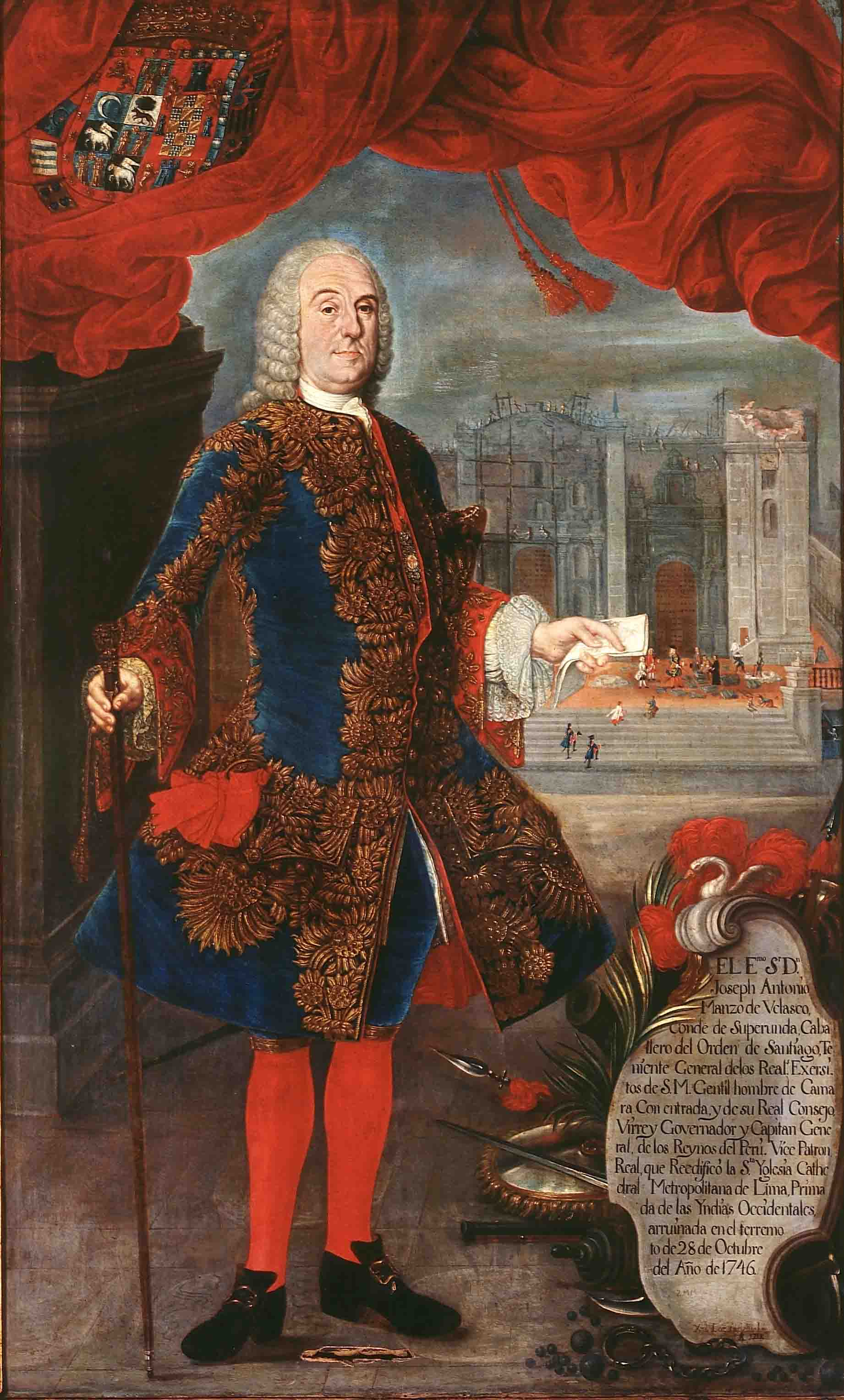 Retrato oficial del Conde de Superunda como Virrey del Peru con la inscripción que dice: «El Excelentísimo Señor Don José Antonio Manzo de Velasco, Conde de Superunda, Caballero de la Orden de Santiago, Teniente General de los Reales Ejercitos de Su Majestad, Gentilhombre de Cámara con entrada y de su Real Consejo, Virrey Gobernador y Capitán General de los Reinos del Perú, Vice Patrono Real que Reedificó la Santa Yglesia Catedral Metropolitana de Lima, Primada de las Indias Occidentales, arruinada en el terremoto del 28 de Octubre del Año 1746».